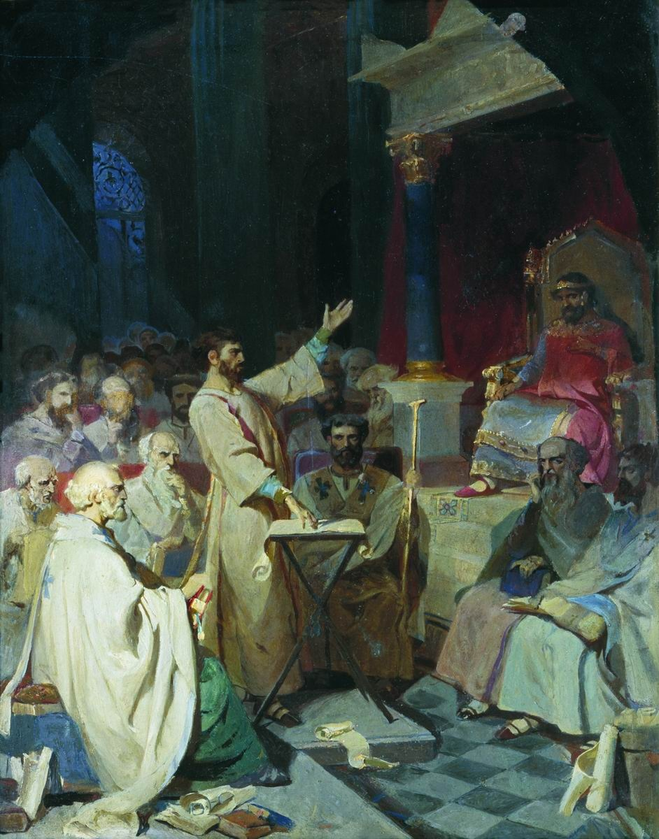 Эскиз росписи в верхней части стены на хорах храма Христа Спасителя в Москве